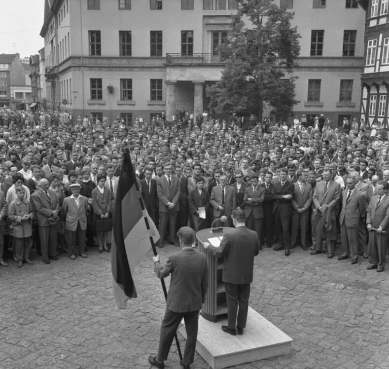 Braunschweig Studenten-Schweigemarsch anl. des 17. Juni (auf dem Domplatz) Information added by Wikimedia users.Tag der Deutschen Einheit am 17. Juni 1953 in Braunschweig. Notiz: Das Bild zeigt den Burgplatz und nicht den Domplatz.